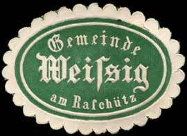 Sealing stamp Title: Gemeinde Weissig am Raschütz Description: grün, weiß, geprägt Place: Weißig am Raschütz size: 3x4 cm